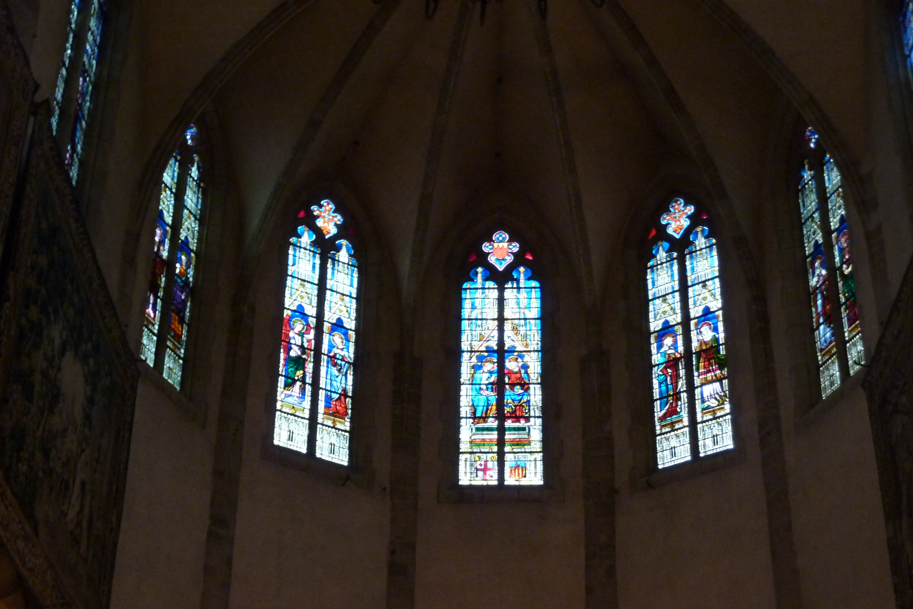 Bleiglasfenster im Chor der Kathedrale von Mende